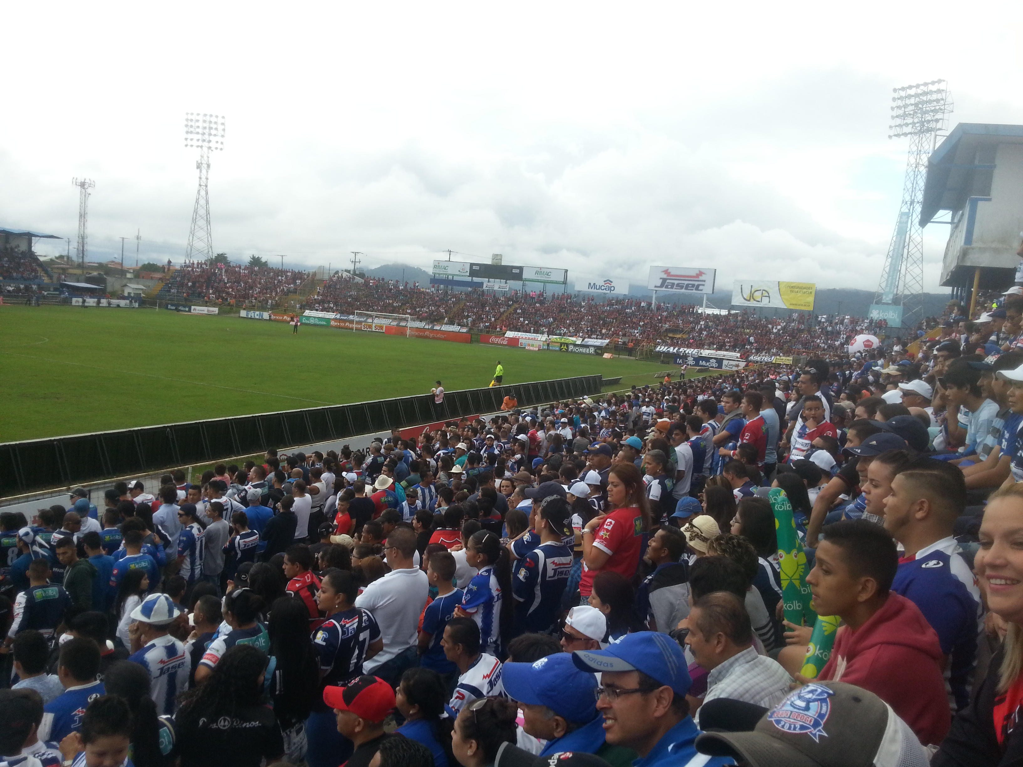 Sectores populares